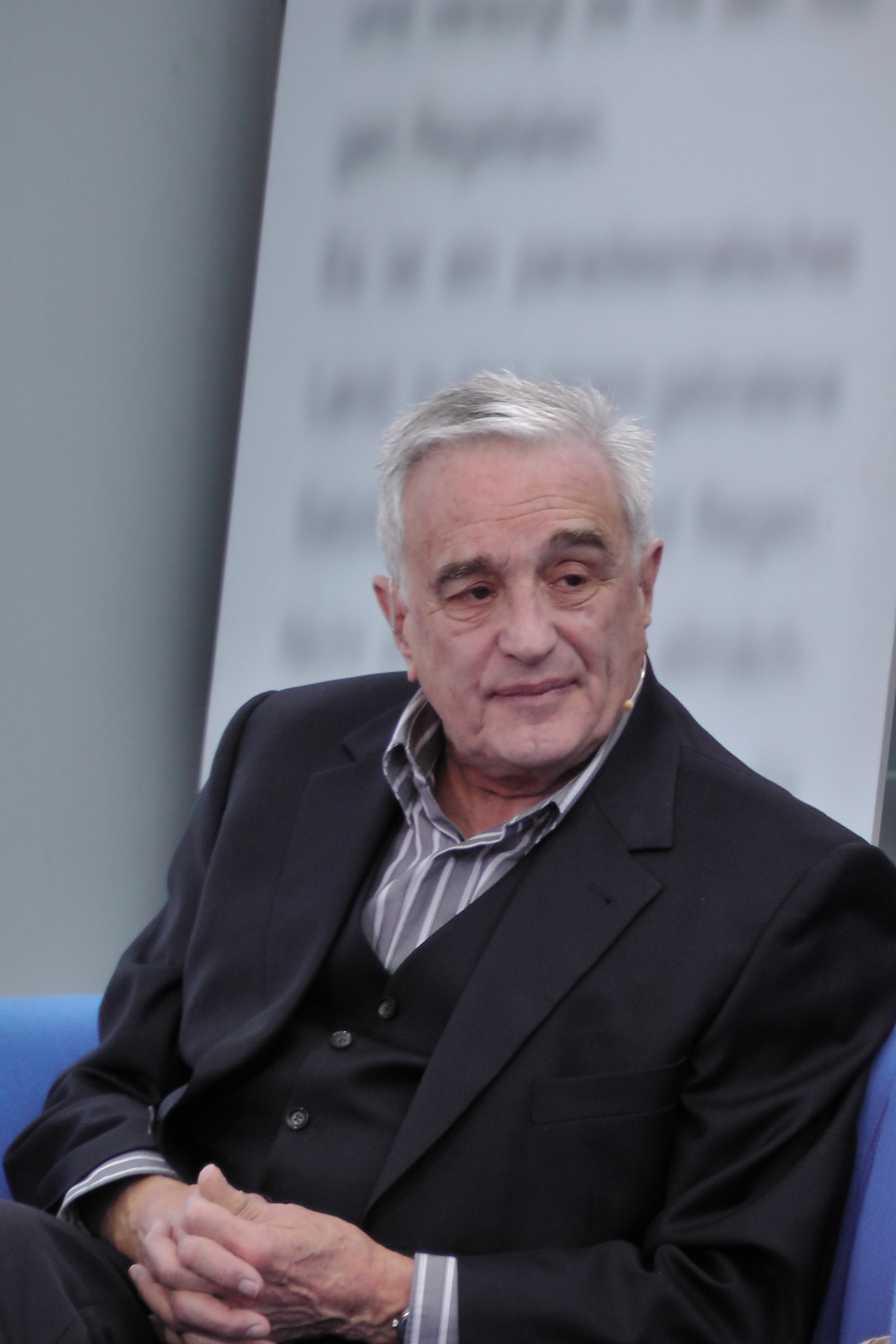 Michael Degen. Dieses Fotos dürfen Sie honorarfrei nutzen, wenn Sie folgenden credit beachten: Copyright: Das blaue Sofa / Club Bertelsmann.